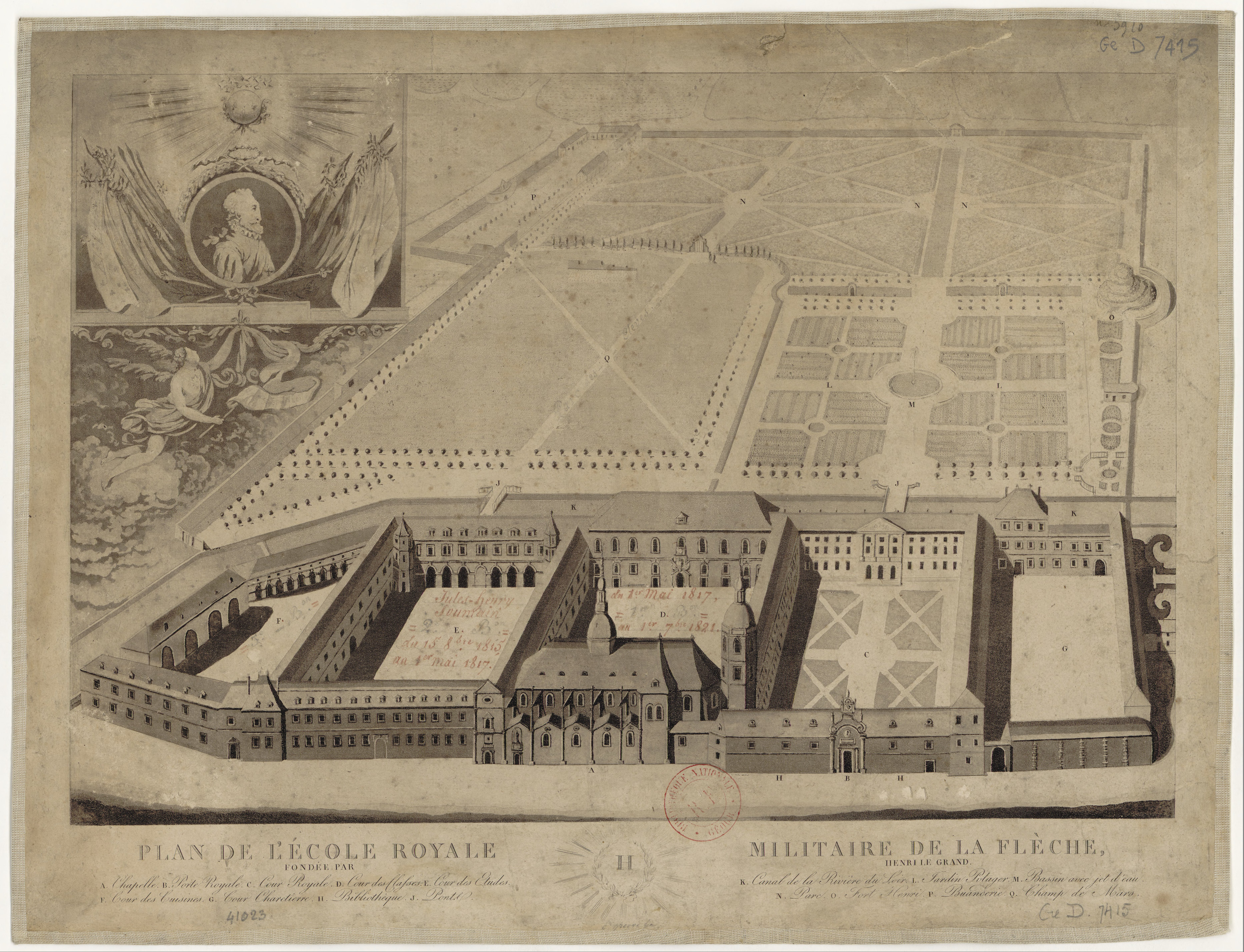 Le plan de l'Ecole royale militaire de La Flèche en 1815